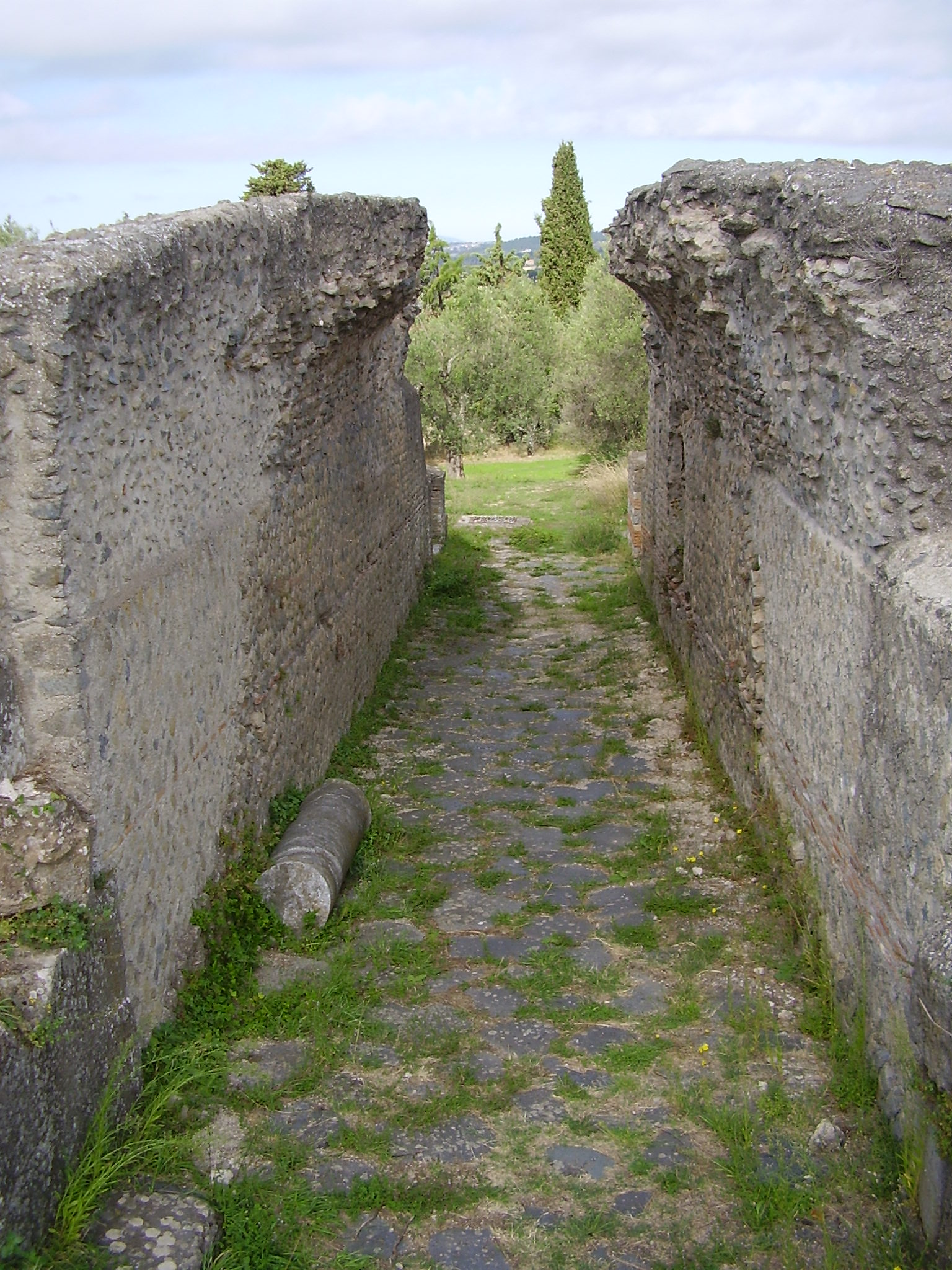 Corridoio di accesso alle domus private, opus reticolatum This is a photo of a monument which is part of cultural heritage of Italy.